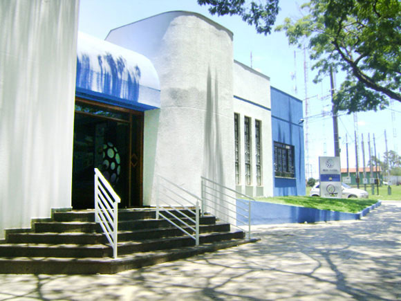 Sede TV Tibagi Rede Massa.